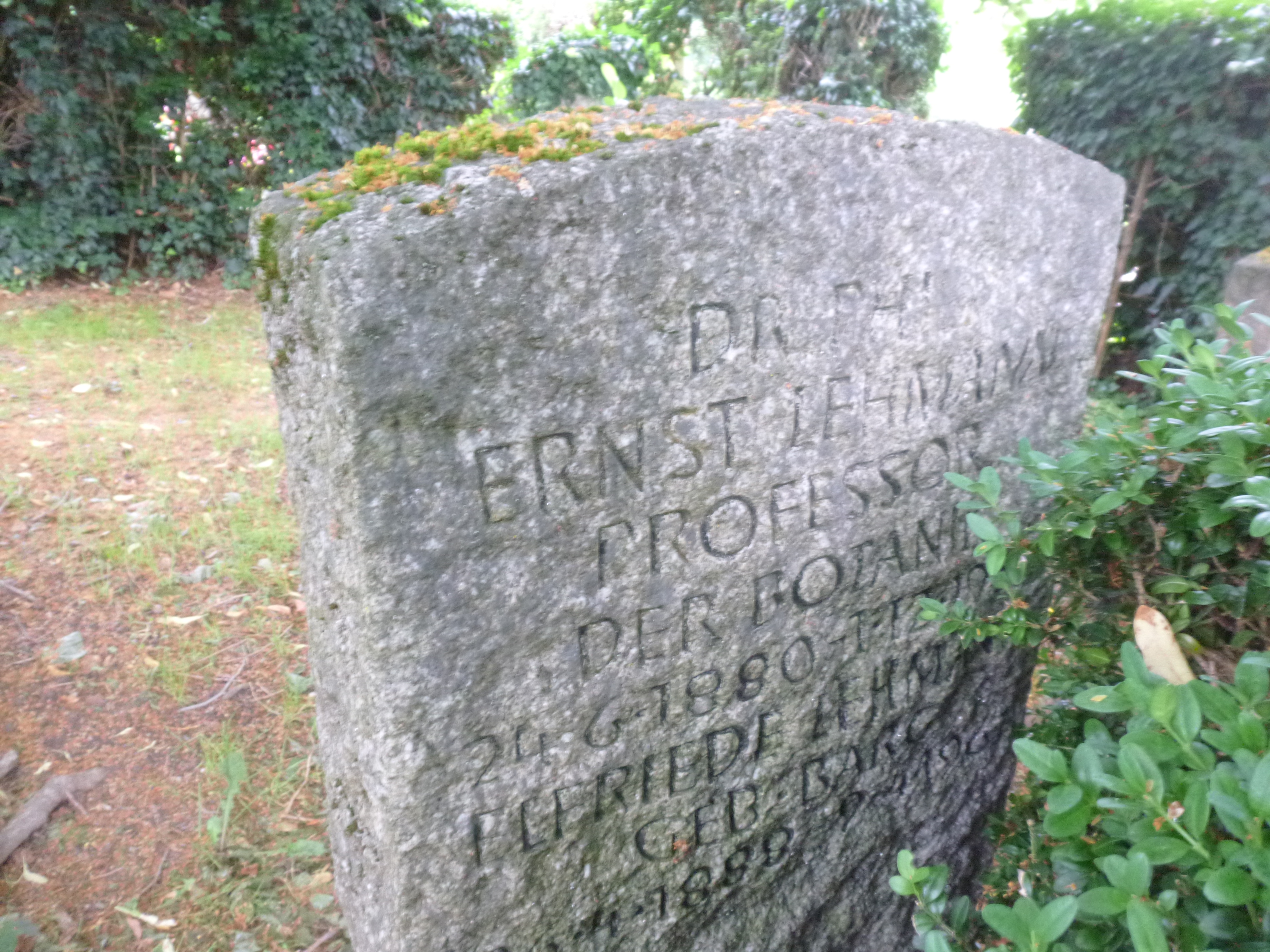 Ernst Lehmann Stadtfriedhof Tübingen